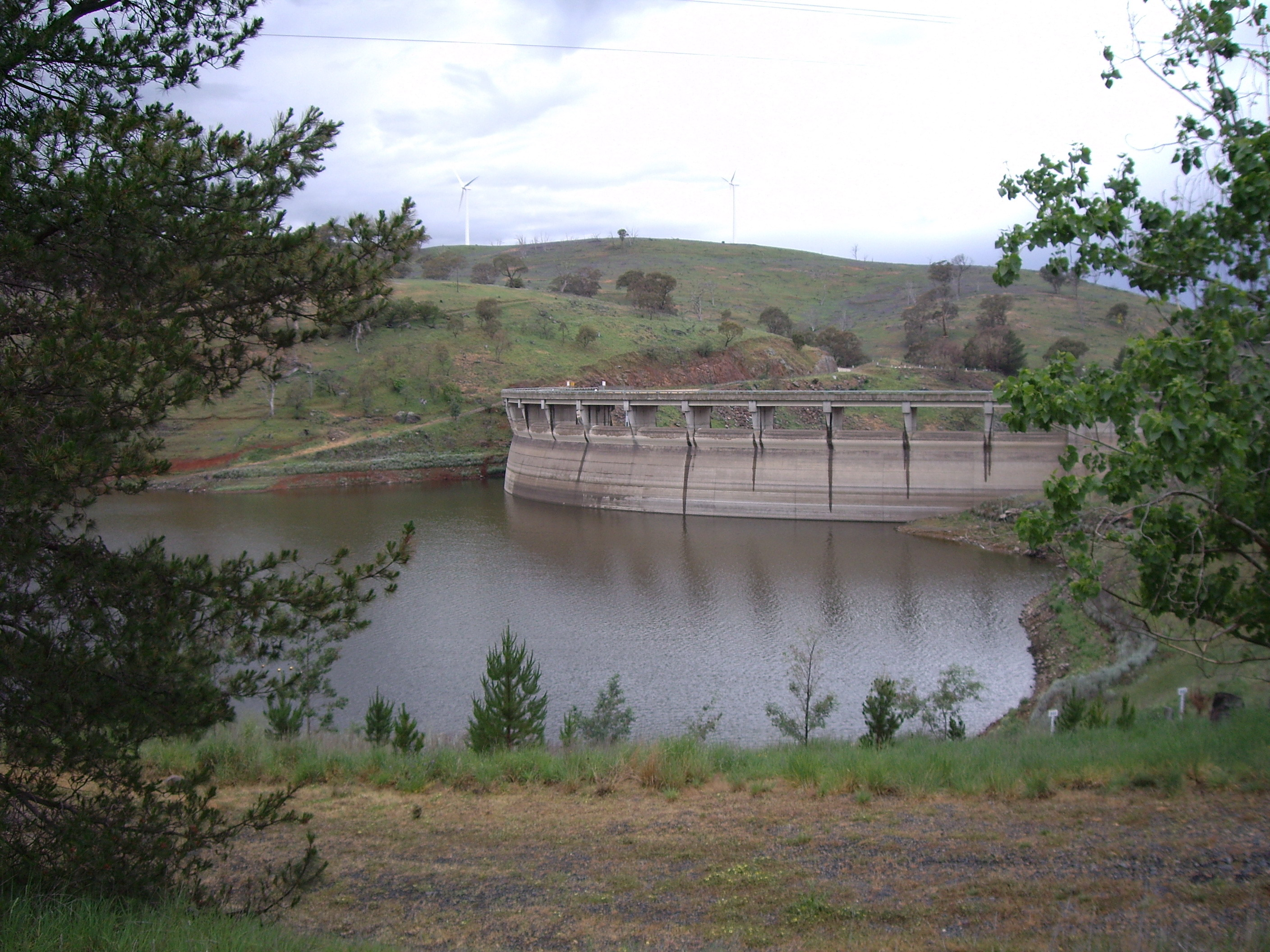 Carcoar Dam